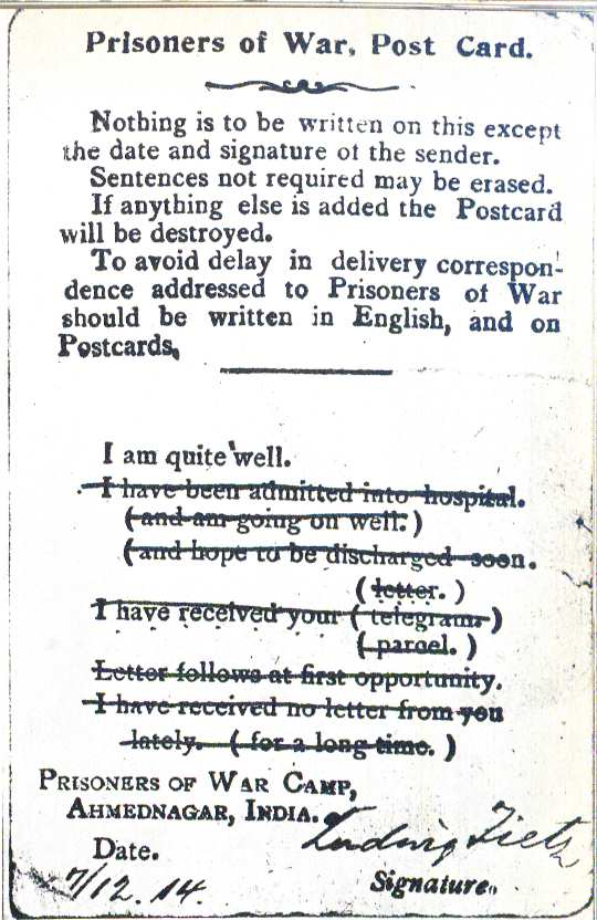 POW postcard WW I Ahmednagar, Ludwig Zietz 7. Dezember 1914